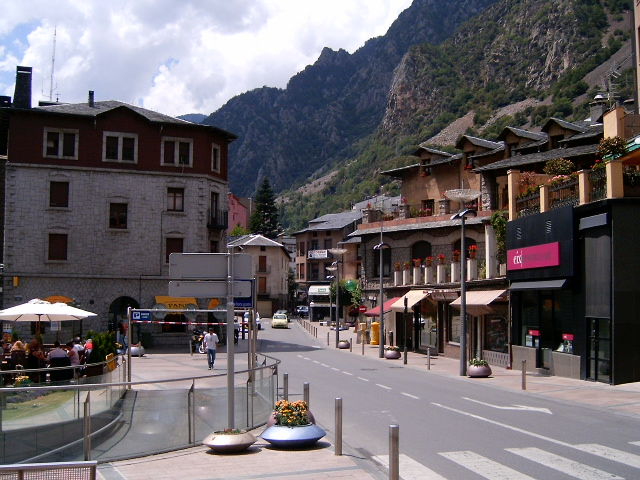 Plaça Rebés d'Andorra la Vella